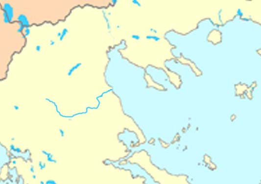 Ποταμός Πηνειός